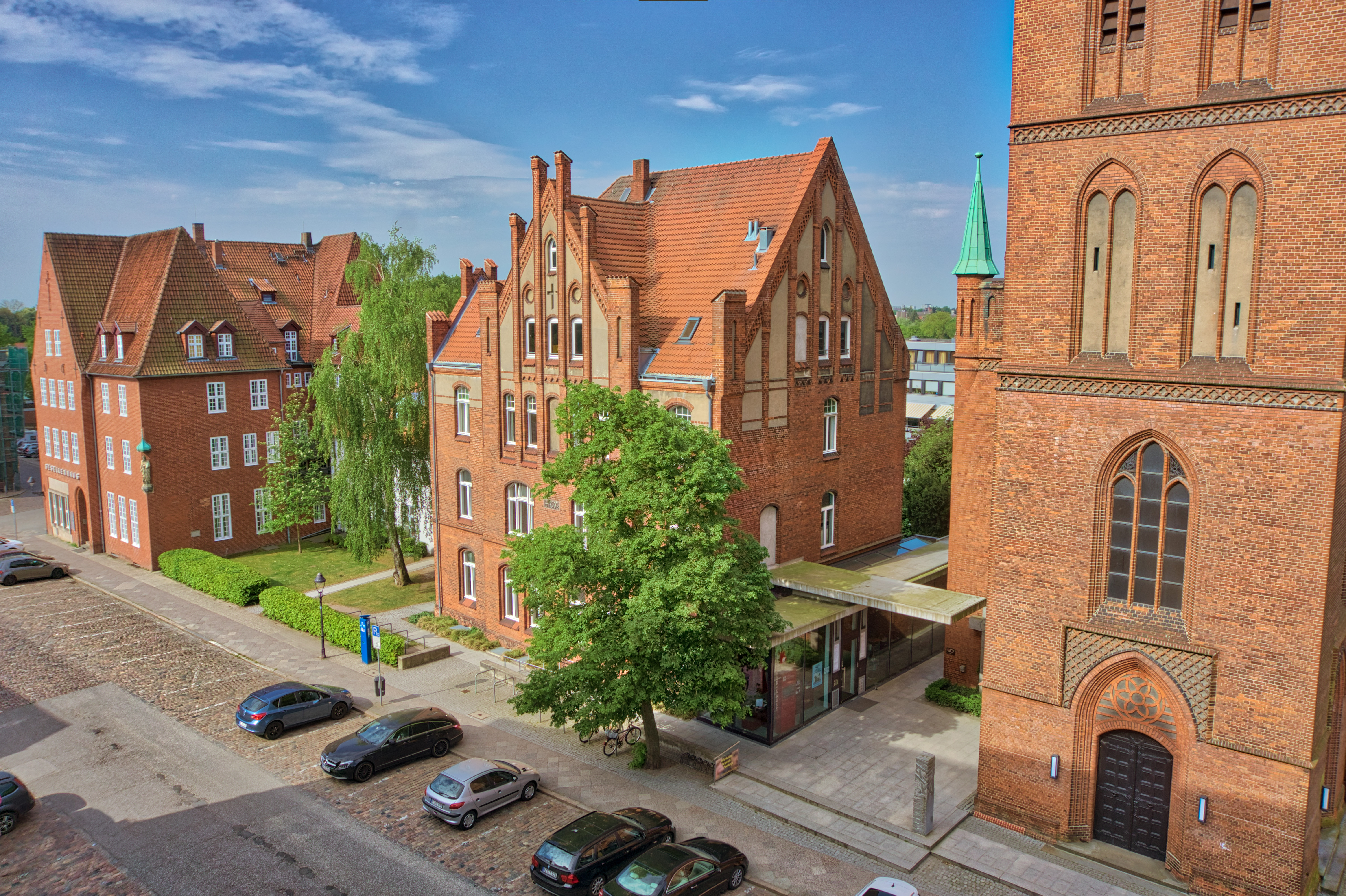 „Haus der Begegnung“, früher Pfarrhaus der katholischen Pfarrei Herz Jesu (Lübeck), heute Versammlungsraum und Treffpunkt mehrerer kirchlicher, caritativer und sozialer Einrichtungen